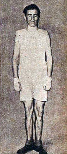 Harry Mallin, champion olympique des poids moyens en 1924.